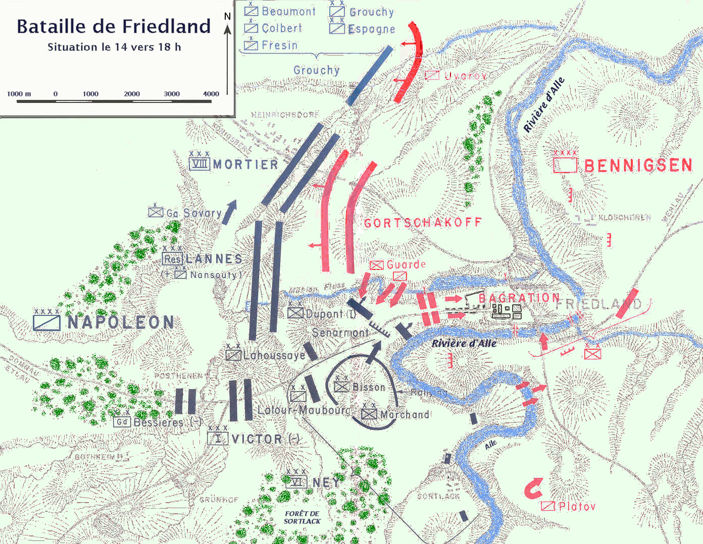 Carte de la bataille de Friedland (1807)